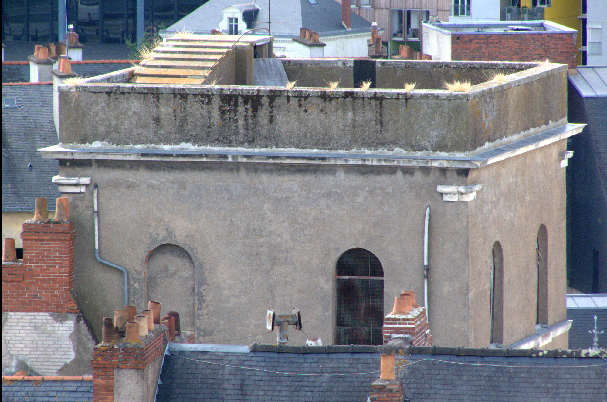 Ancien observatoire de la Marine - Nantes - Depuis la tour du musée Dobrée vue sur la terrasse de l'ancien observatoire astronomique de la Marine .